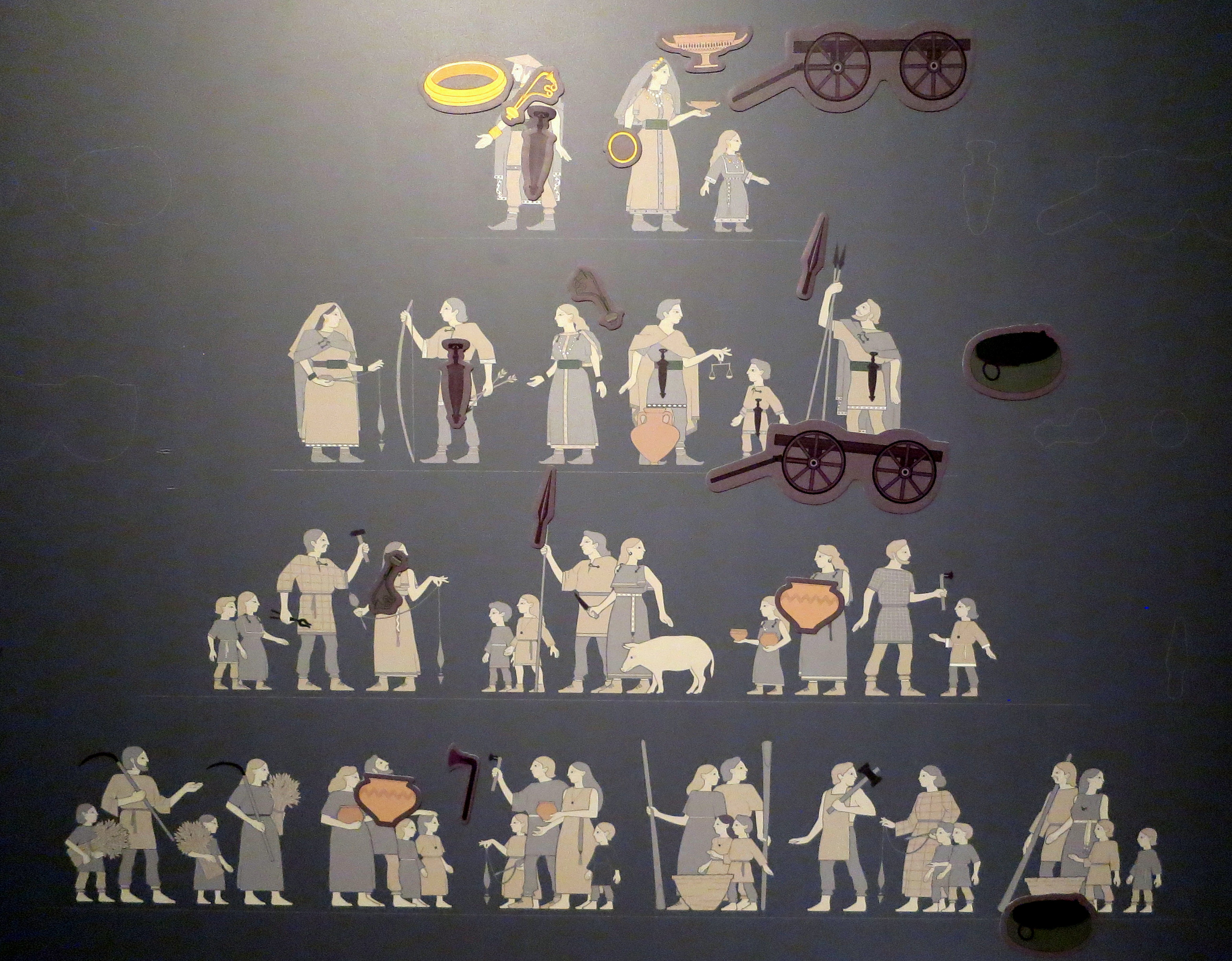 Nur anhand archäologischer Befunde kann man sich die Schichtung der frühkeltischen Gesellschaft vorstellen. Ganz oben stehen die Eliten, die in Prunkgräbern bestattet werden, denen Gegenstände aus Gold und andere Kostbarkeiten beigegeben werden.